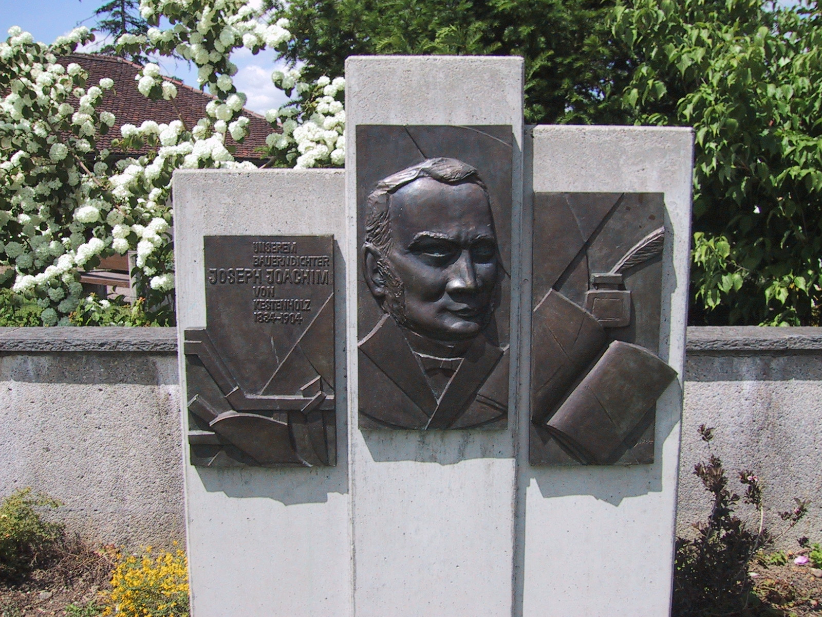 Denkmal des Bauerndichters Josef Joachim in Kestenholz, Kanton Solothurn